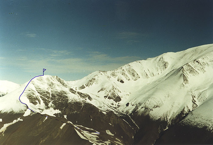 Bazardüzü, Cənub 3860 m, Şimal-Şərqi sirkindən və Şərq silsiləsi ilə